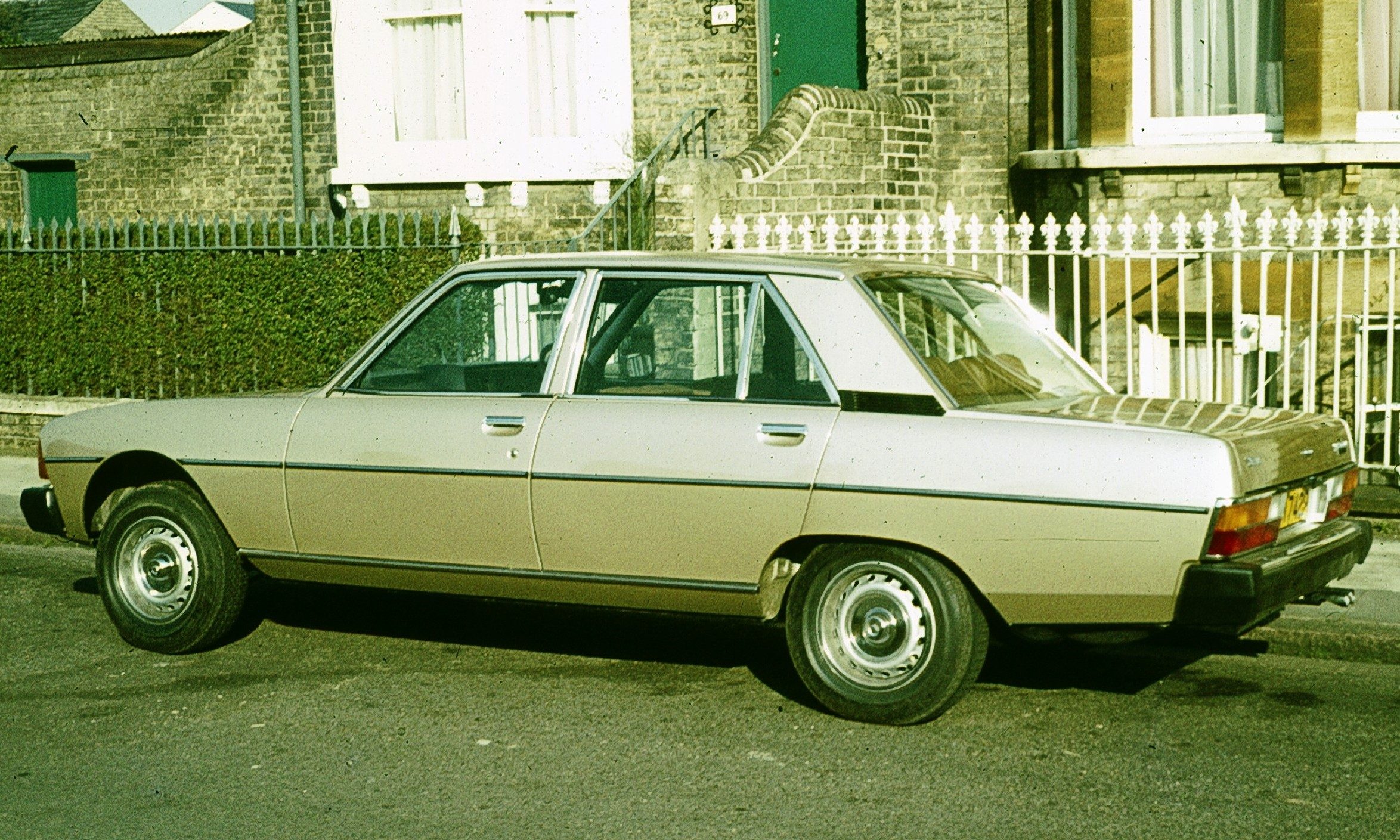 Peugeot 604 Cambridge